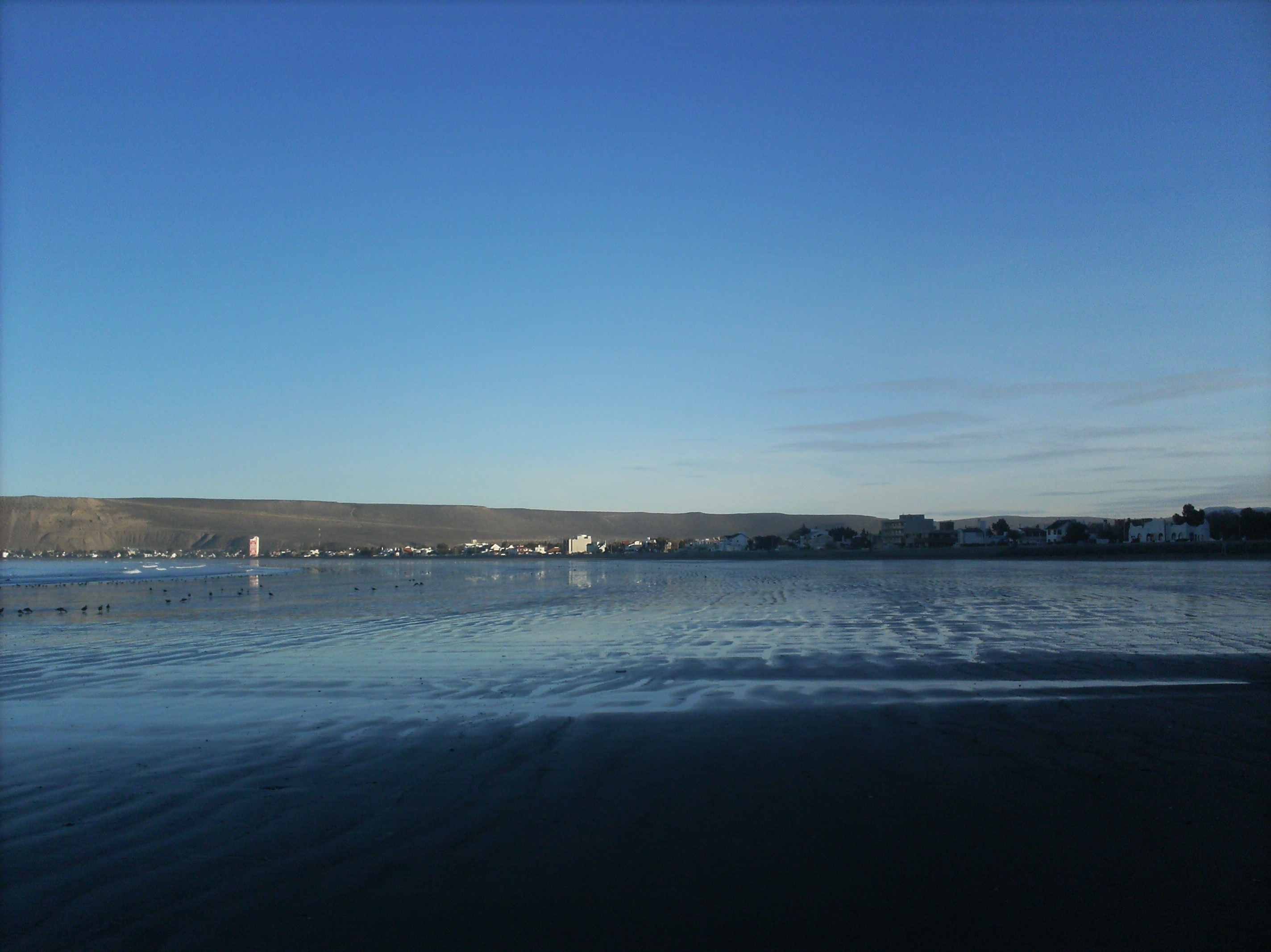 desde su bella playa gran parte del balneario mas austral americano